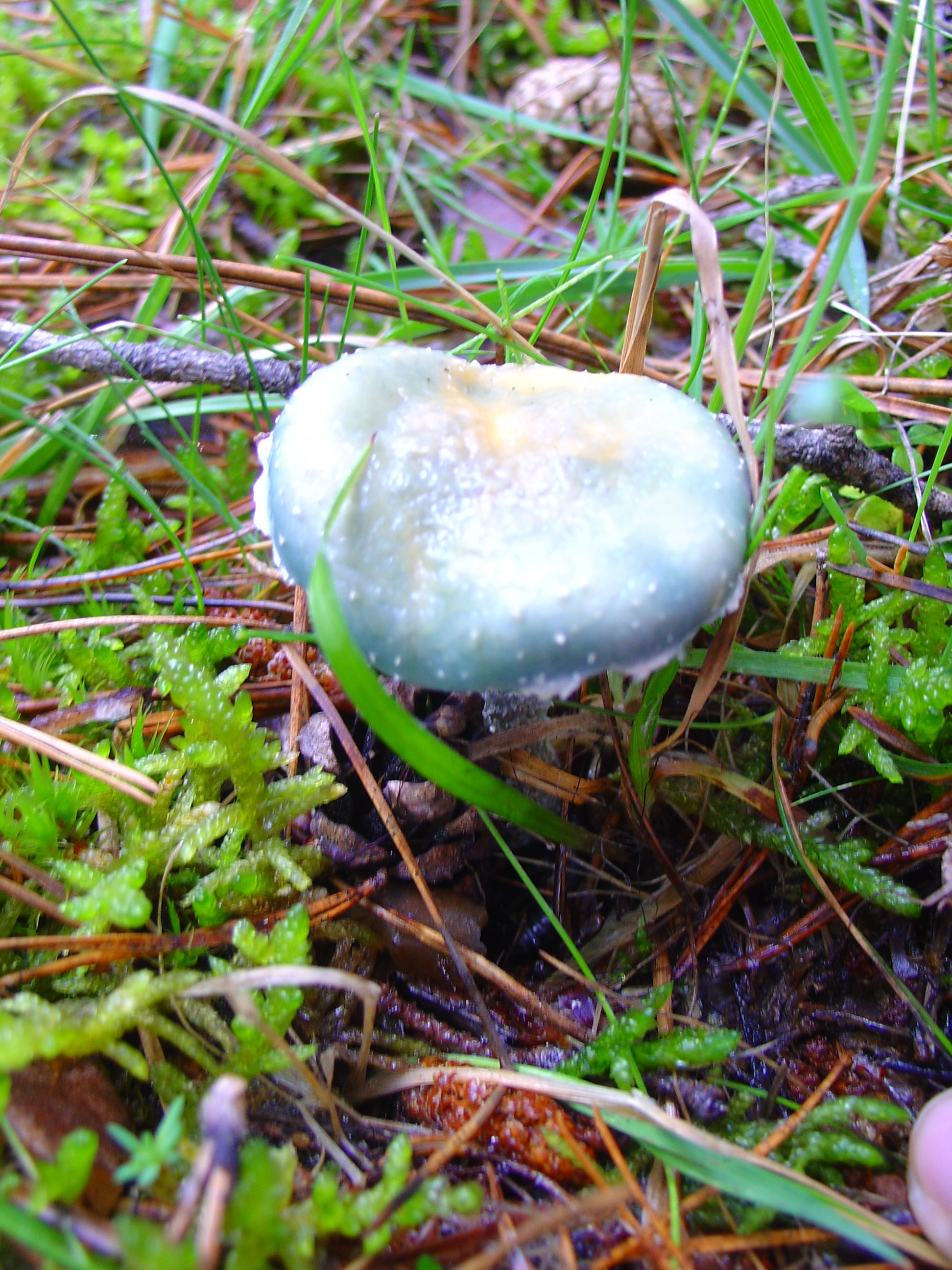 Stropharia de la sierra de Valdemeca, Cuenca, España